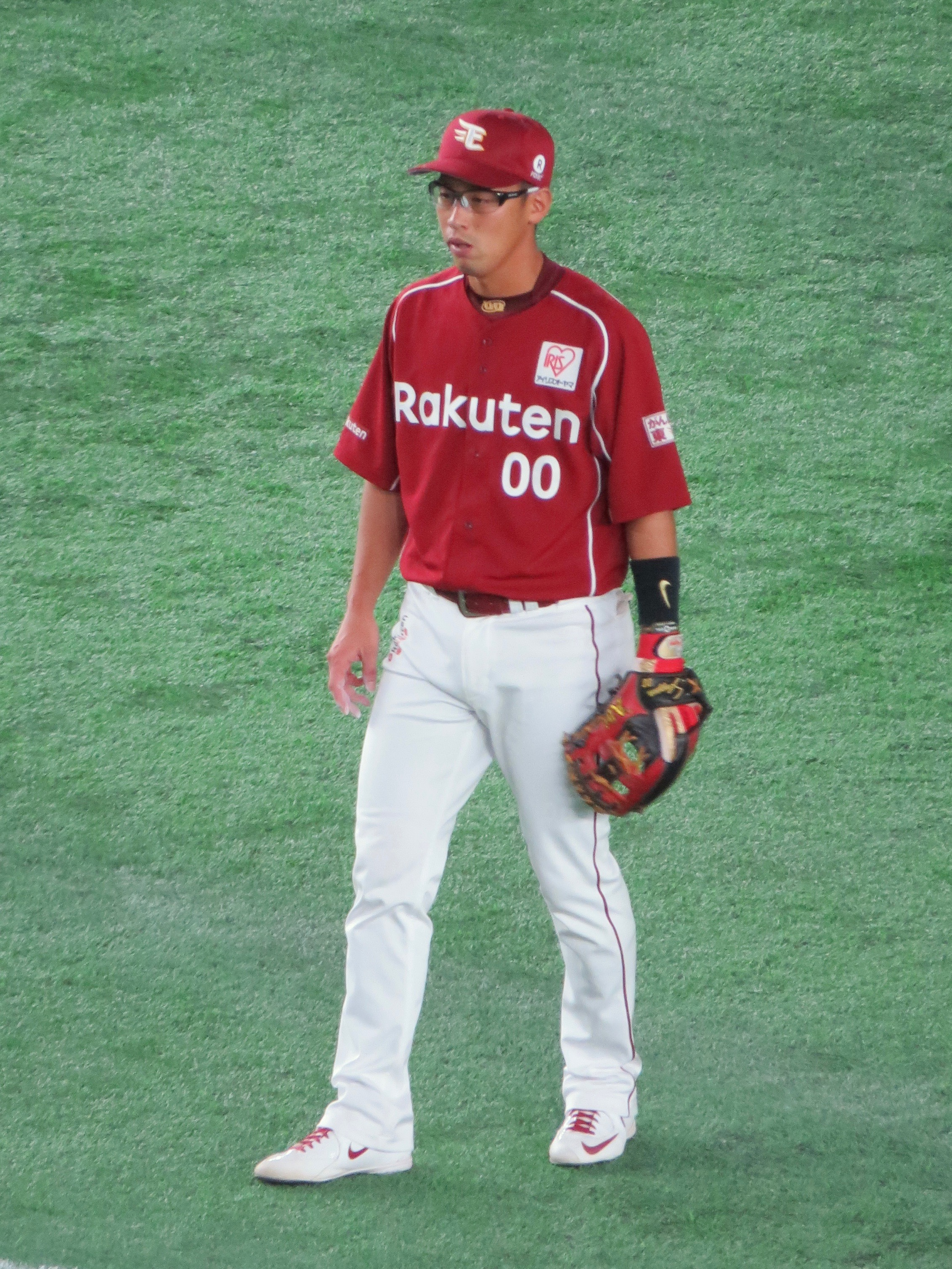 東京ドームにて